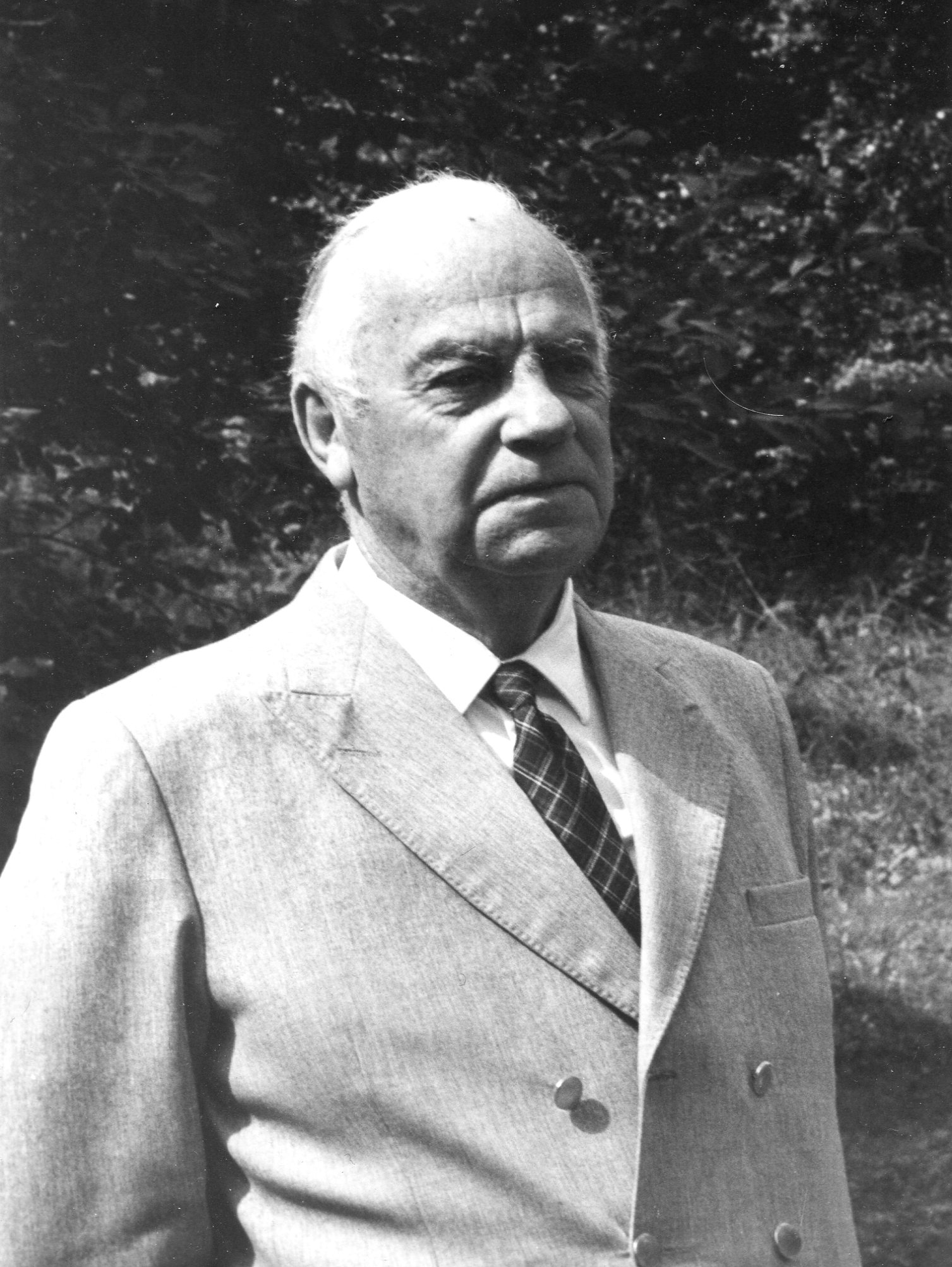 Magnus Stenbock utanför Herrborum